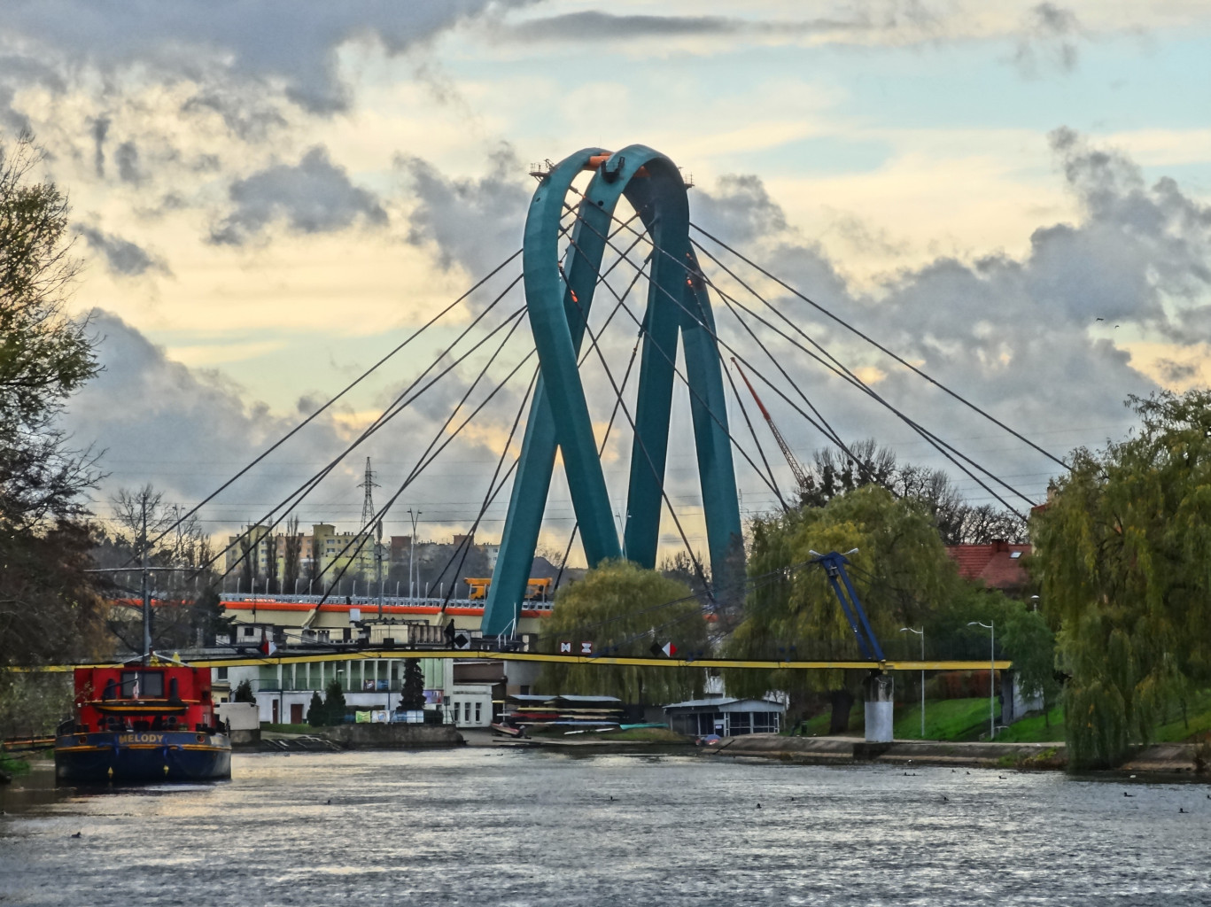 Pylon Trasy Uniwersyteckiej nad Brdą w Bydgoszczy